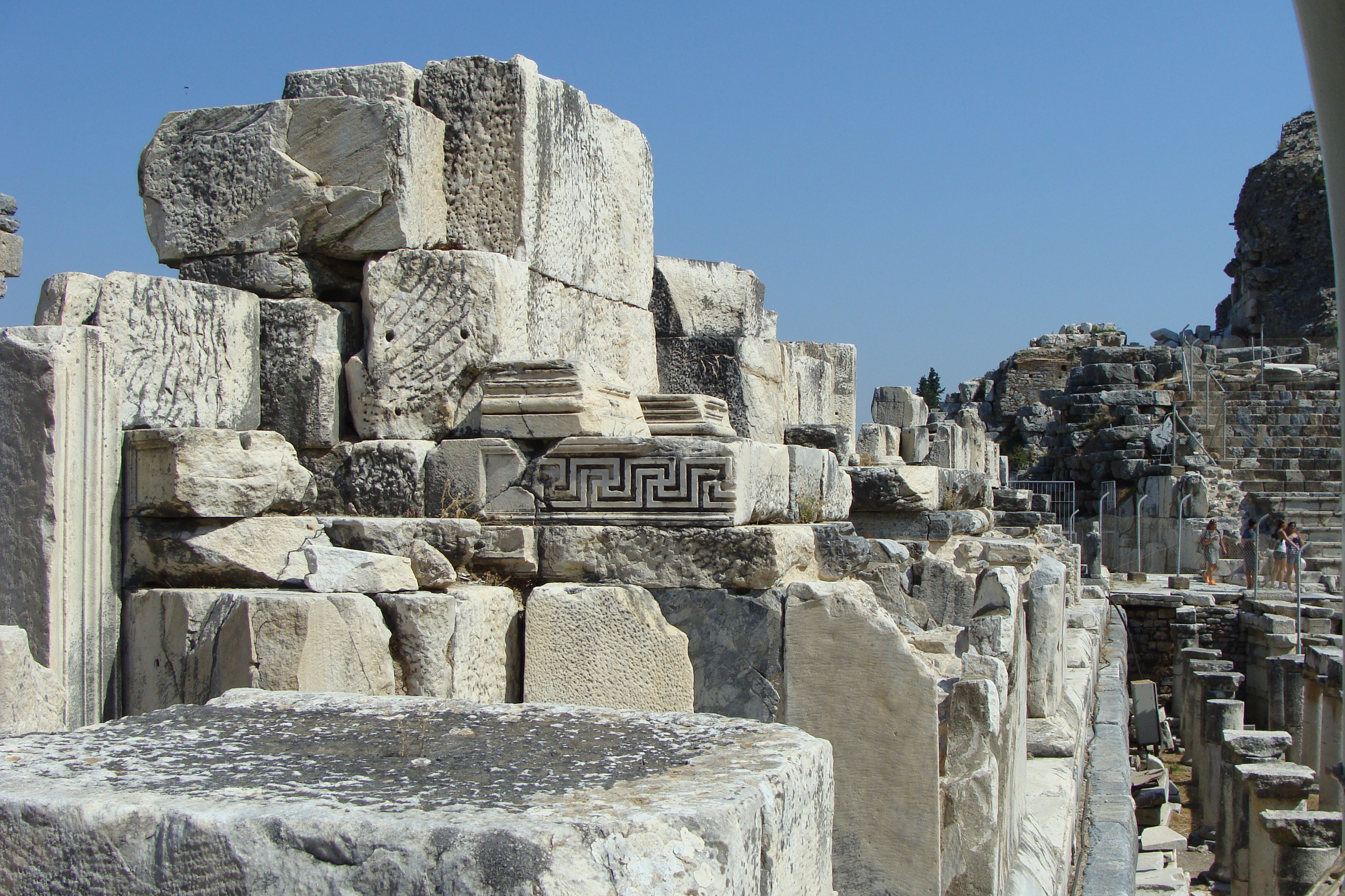 Ornamentyka w pozostałościach teatru w ruinach antycznego miasta Efez.